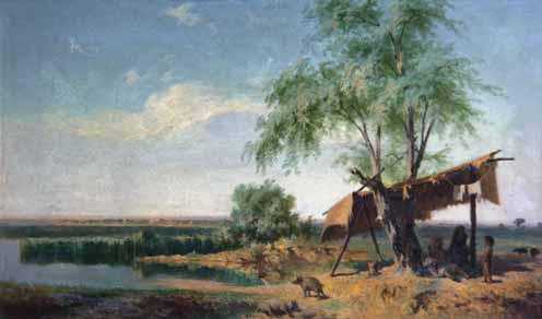 Henric Trenk - Lacul Căldăruşani (Ţigani sub cort), ulei pe pânză, deţinător: Muzeul Naţional de Artă al României din Bucureşti.